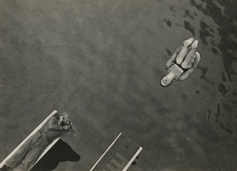 1932. Прыжок в воду